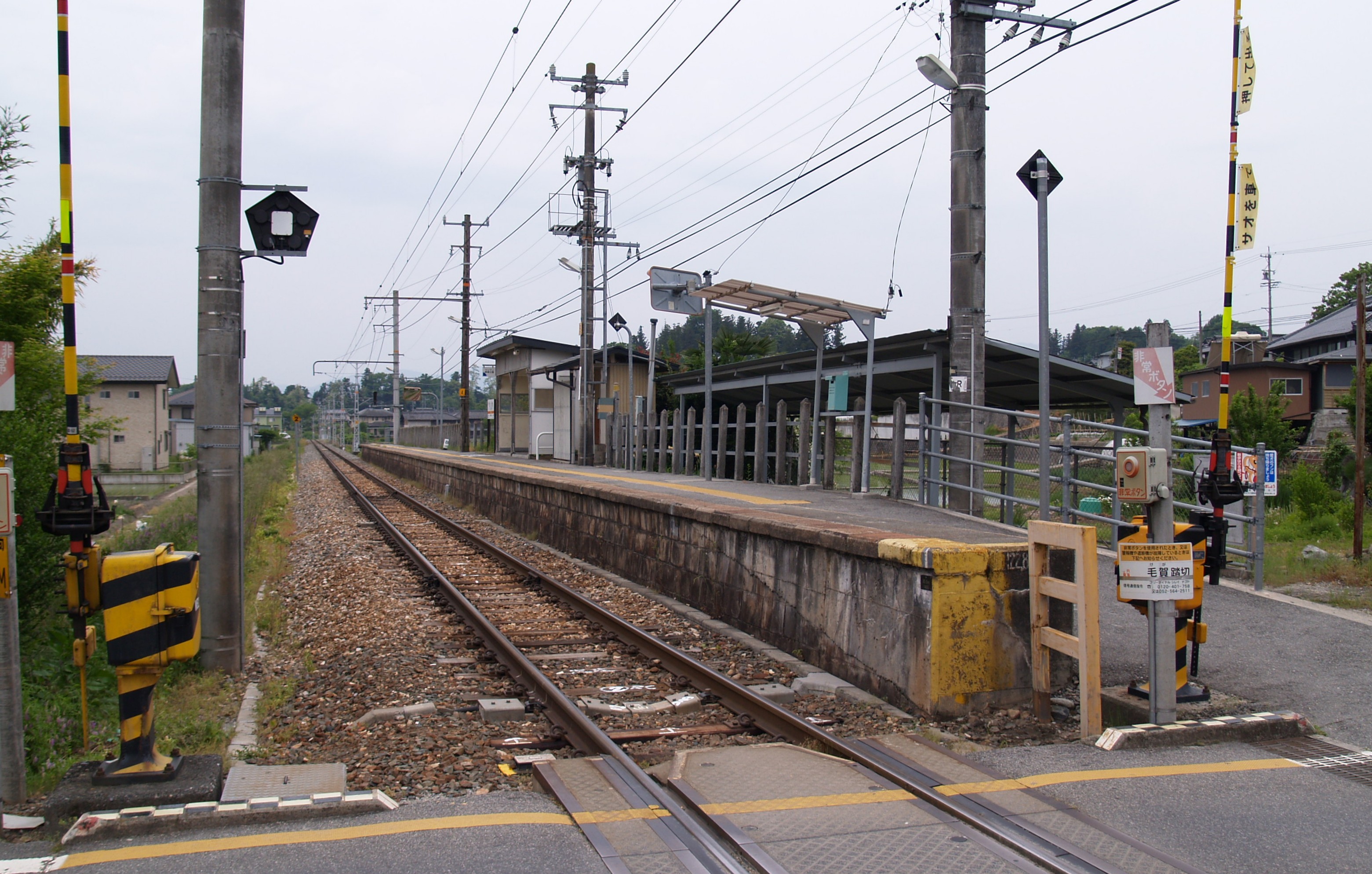 毛賀駅（隣接する踏切から）